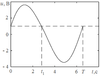 График гармонической (почти) функции на одном периоде колебания